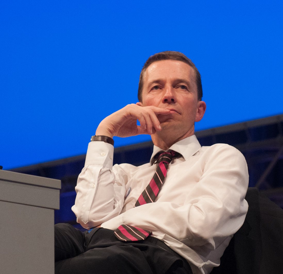 a.o. Bundesparteitag der Alternative für Deutschland, 4. Juli 2015 in Essen, Gruga Halle a.o. Bundesparteitag der Alternative für Deutschland am 4./5. Juli 2015 in Essen, Gruga Halle